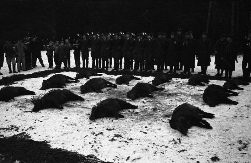 Pakistanischer Staatspräsident Ayoub Khan zu Besuch in Deutschland Vorbereitungen zur Jagd auf Schwarzwild im Saupark Springe (Hannover)